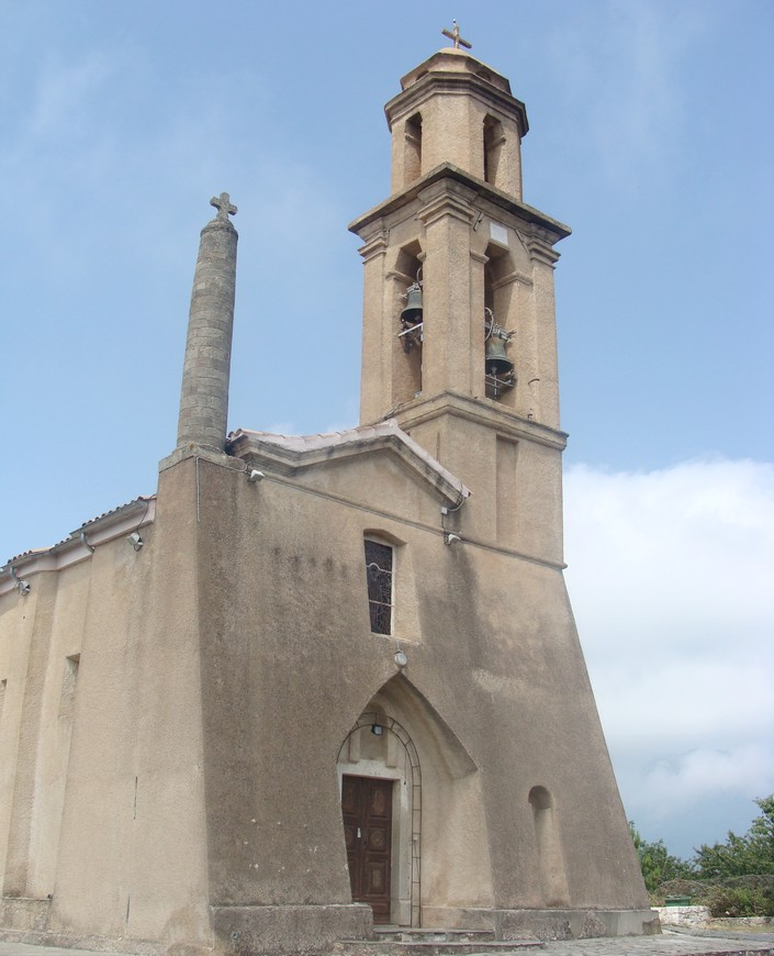 L'église paroisssiale de Prunelli-di-Fiumorbo, au village. Le clocher-tour est usuel en Corse, mais le reste de cette façade est original.